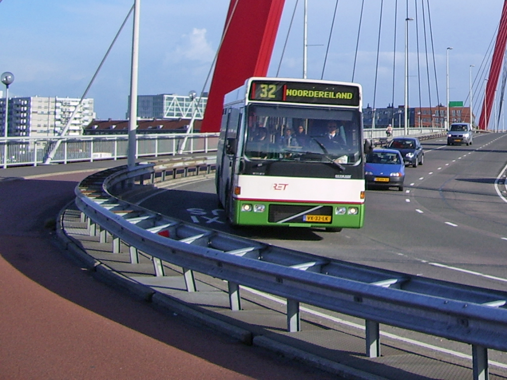 Berkhof/Volvo Duvedec-bus 688 van de RET op de Willemsbrug in RotterdamDe aanduiding Noordereiland op de richtingfilm is foutief. De bus komt juist van het Noordereiland af.